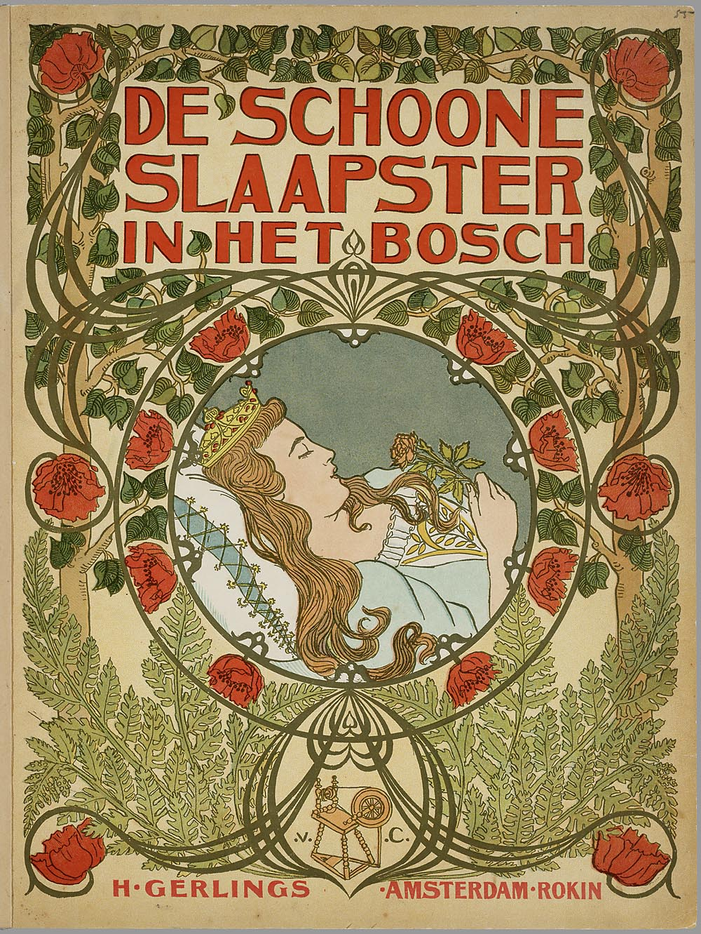 De schoone slaapster in het bosch : een sprookje van Moeder de Gans / met teekeningen van J.G. van Caspel ; [naar Charles Perrault]